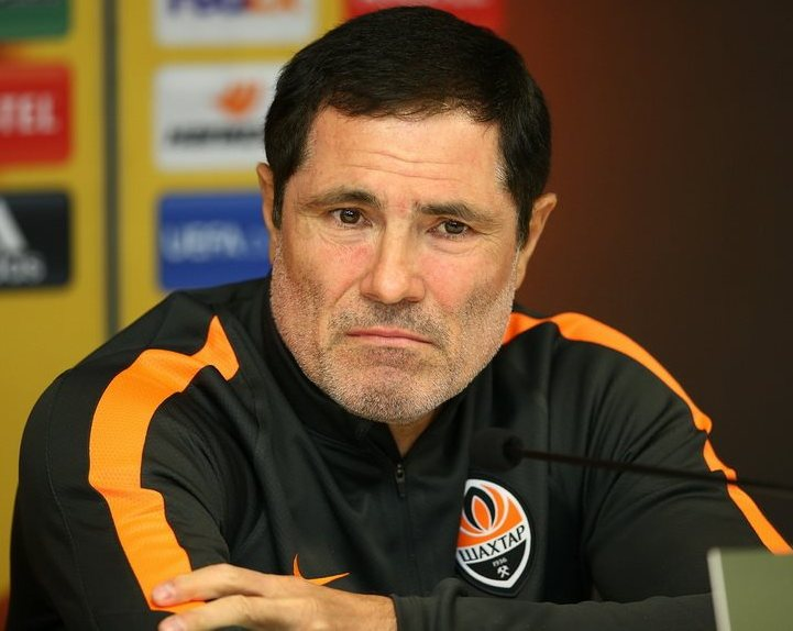 Молдовський тренер Олександр Спиридон.